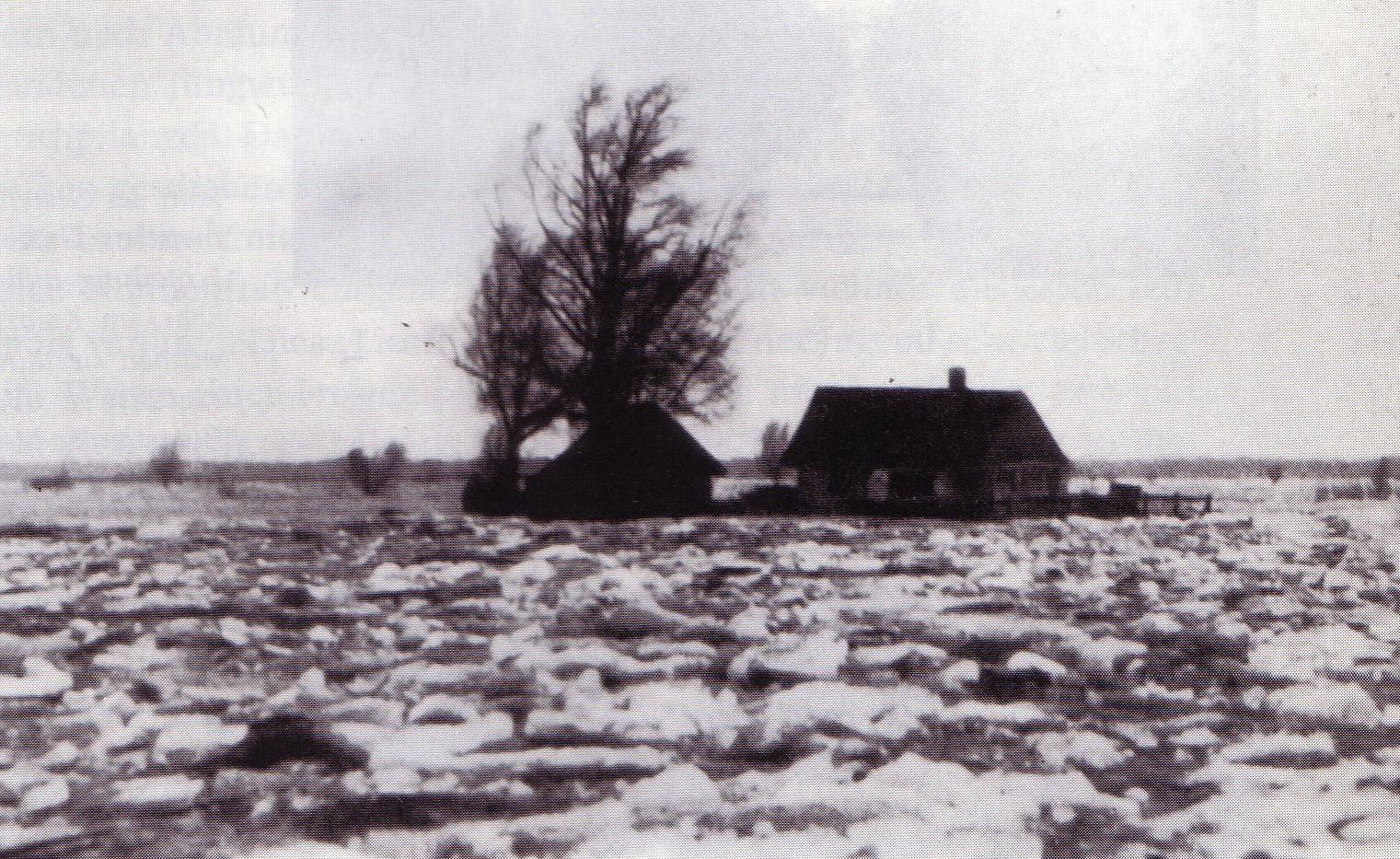 Hochwasser und Treibeis mit eingeschlossenem Bauernhof im nördlichen Ostpreußen